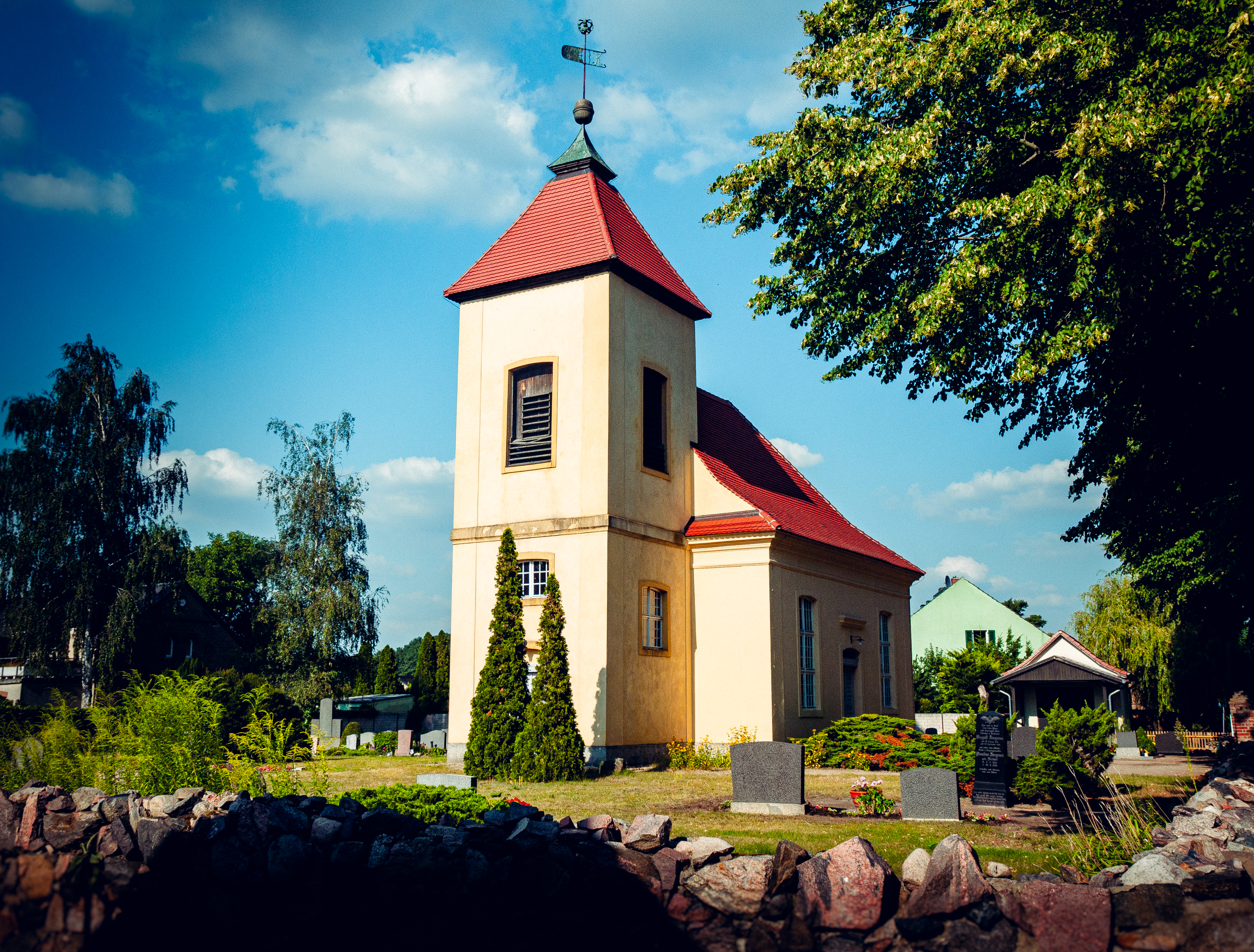 Dorfkirche Nudow, August 2020 B